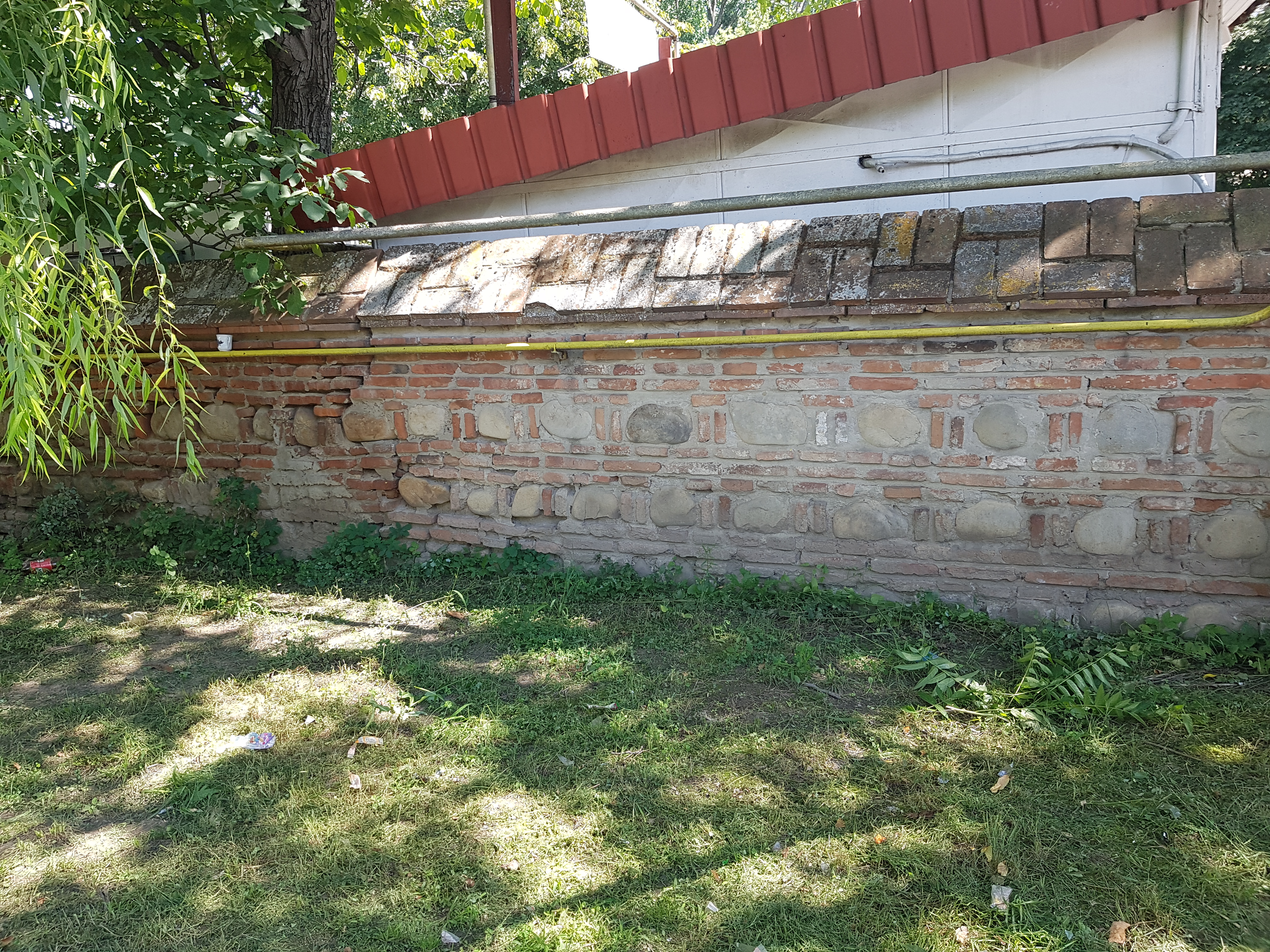 Zid de incintă 02